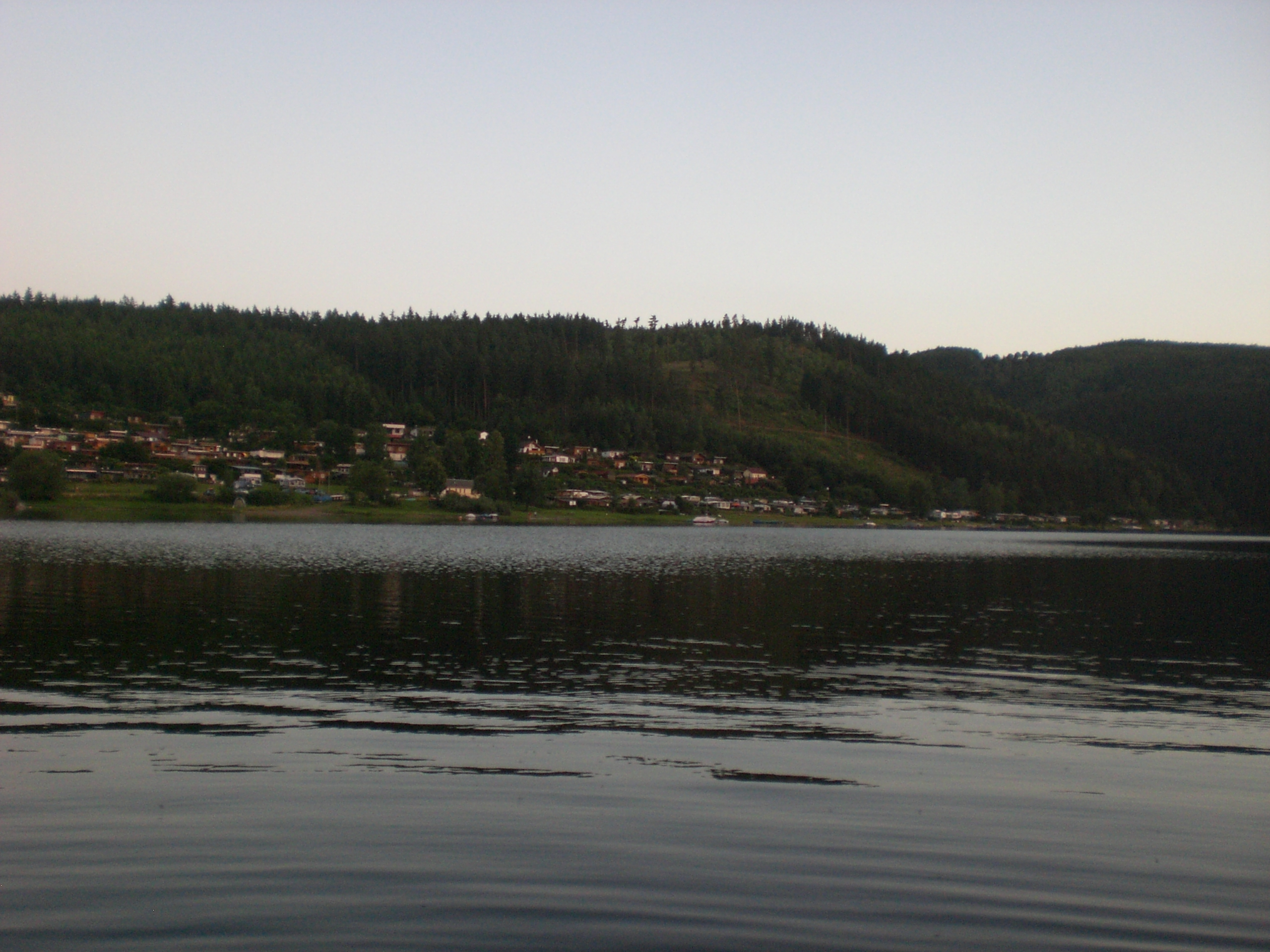 Der Campingplatz "Hopfenmühle" aus Sicht des anderen Ufers.